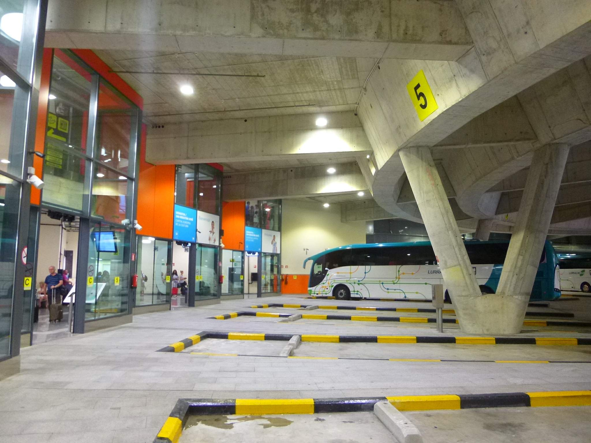 San Sebastián - Estación de Autobuses